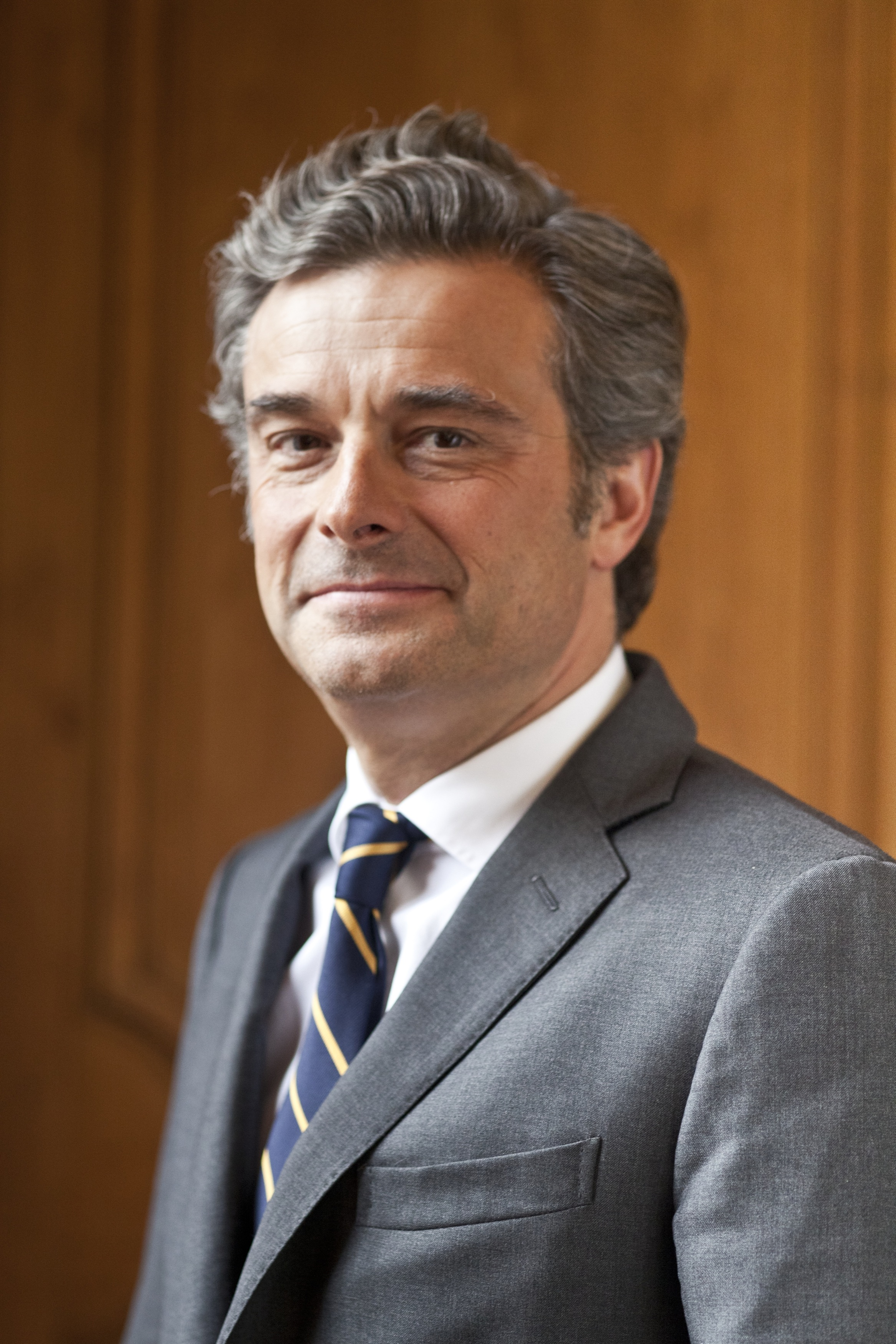 Portrait de Philippe Oddo